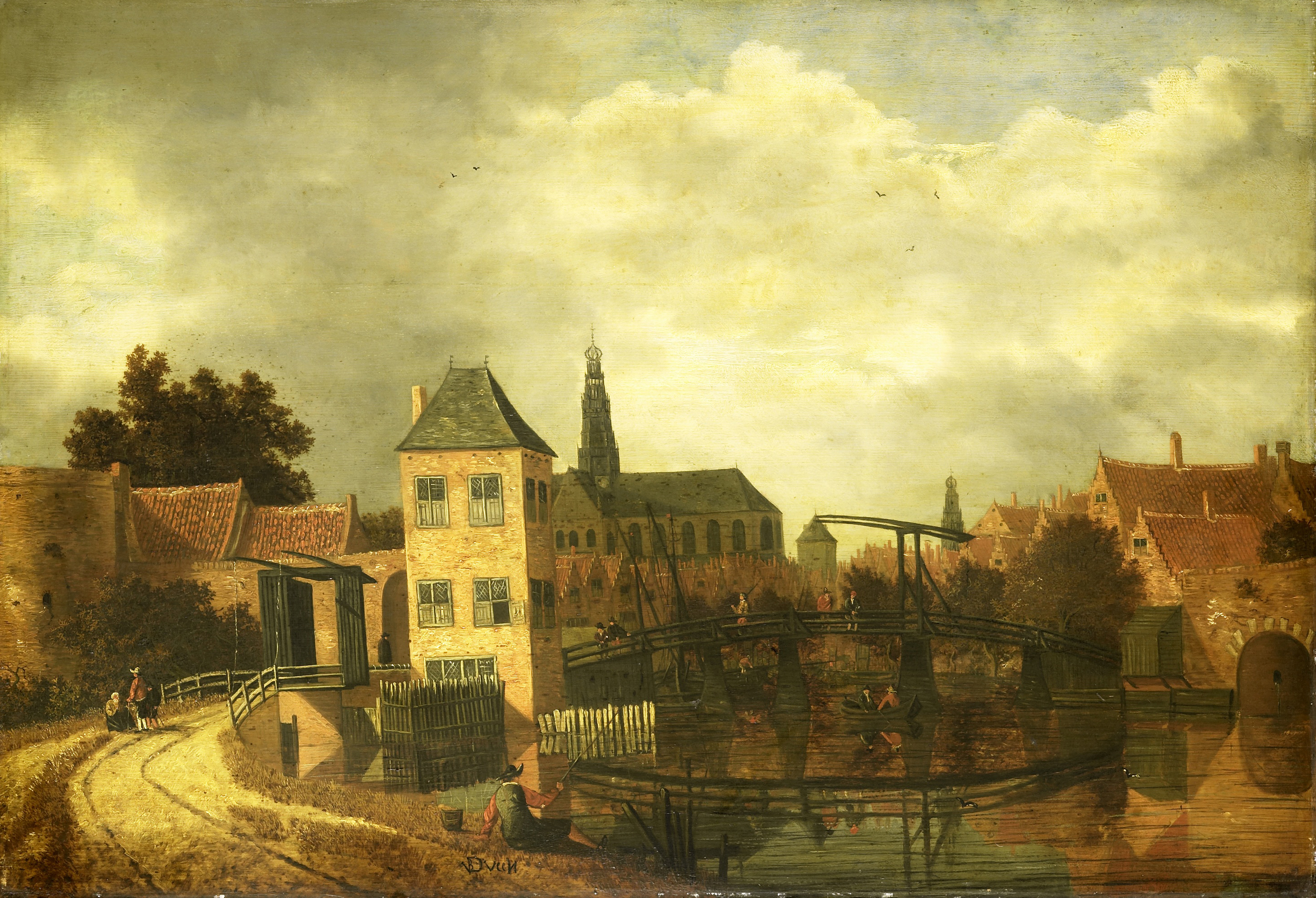 Gezicht op de stad Haarlem over het Spaarne bij de Eendjespoort. Achter de poort een houten ophaalbrug, op de voorgrond zit een man te vissen.